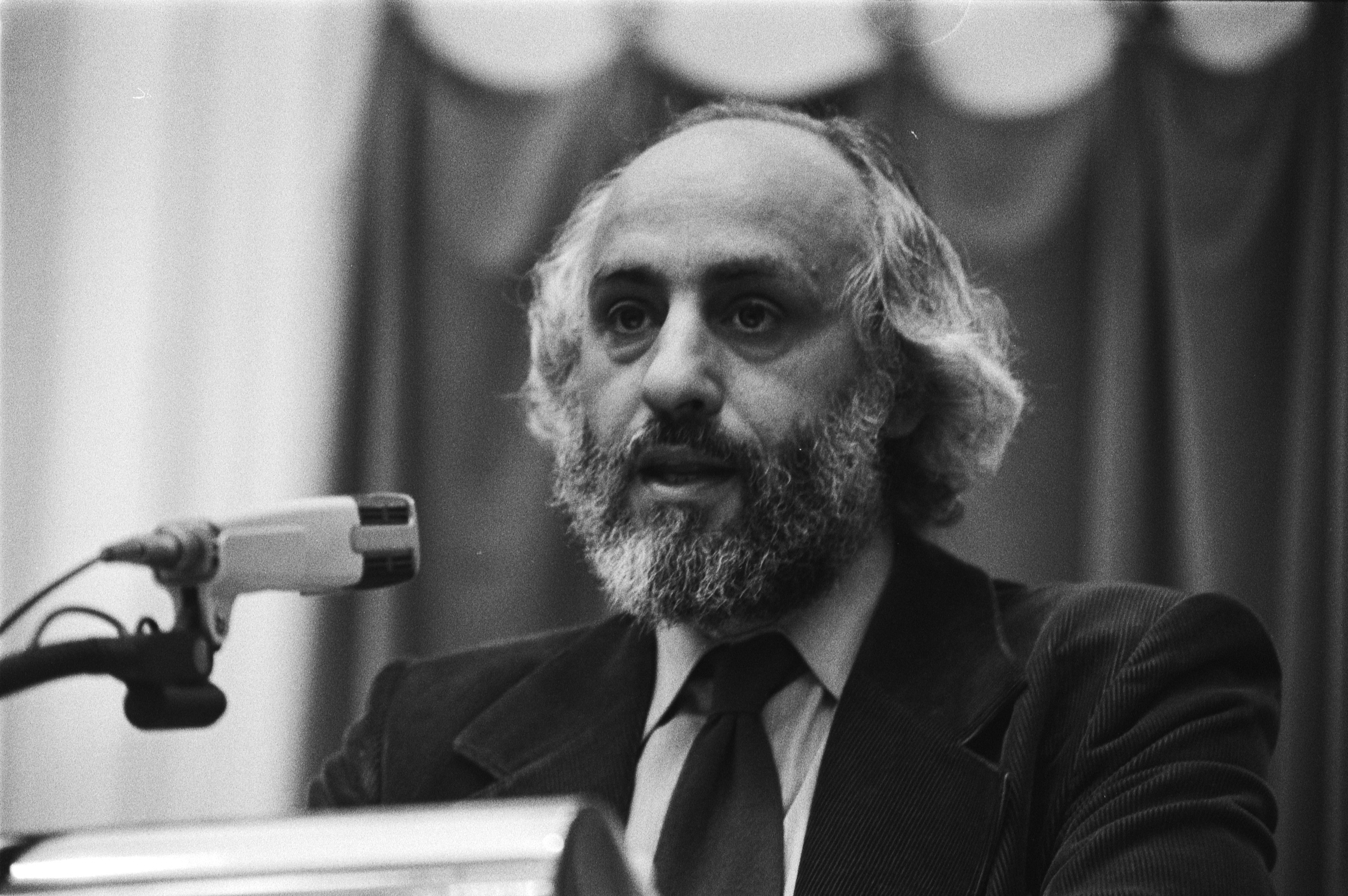 Collectie / Archief : Fotocollectie Anefo Reportage / Serie : [ onbekend ] Beschrijving : Tweede Kamer debat; Jansen (PPR) interpelleert Van der Klaauw (BZ) over uraniumleveranties Brazilie Datum : 26 april 1978 Locatie : Den Haag, Zuid-Holland Trefwoorden : parlementaire debatten, parlementariërs, politiek, portretten Persoonsnaam : Jansen, J.L.A. Fotograaf : Verhoeff, Bert / Anefo Auteursrechthebbende : Nationaal Archief Materiaalsoort : Negatief (zwart/wit) Nummer archiefinventaris : bekijk toegang 2.24.01.05 Bestanddeelnummer : 929-6896